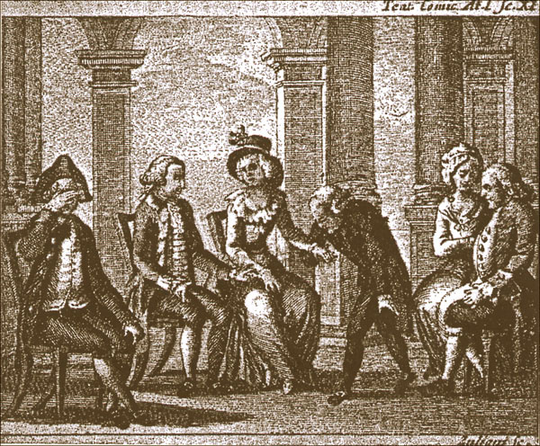 „La bottega del caffè“. Carlo Goldoni. Etching, 18th century